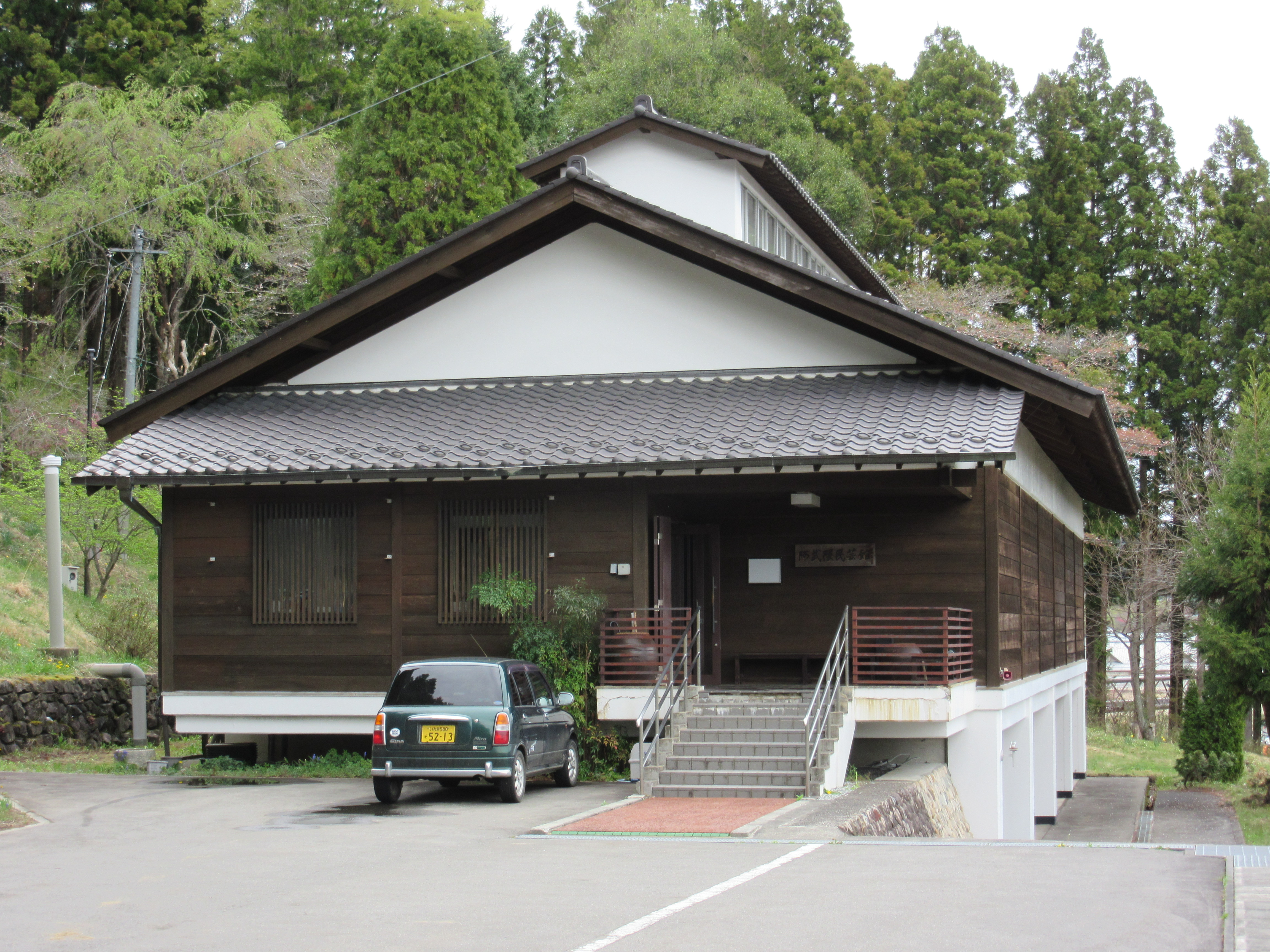 阿武隈民芸館 Canon PowerShot SX600 HS